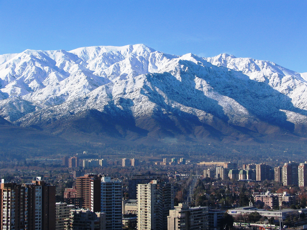 Santiago, Chile. Vista desde Las Condes a La Reina. Cerro San Ramón, (de Ramón), quebrada de Macul, cerro provincia